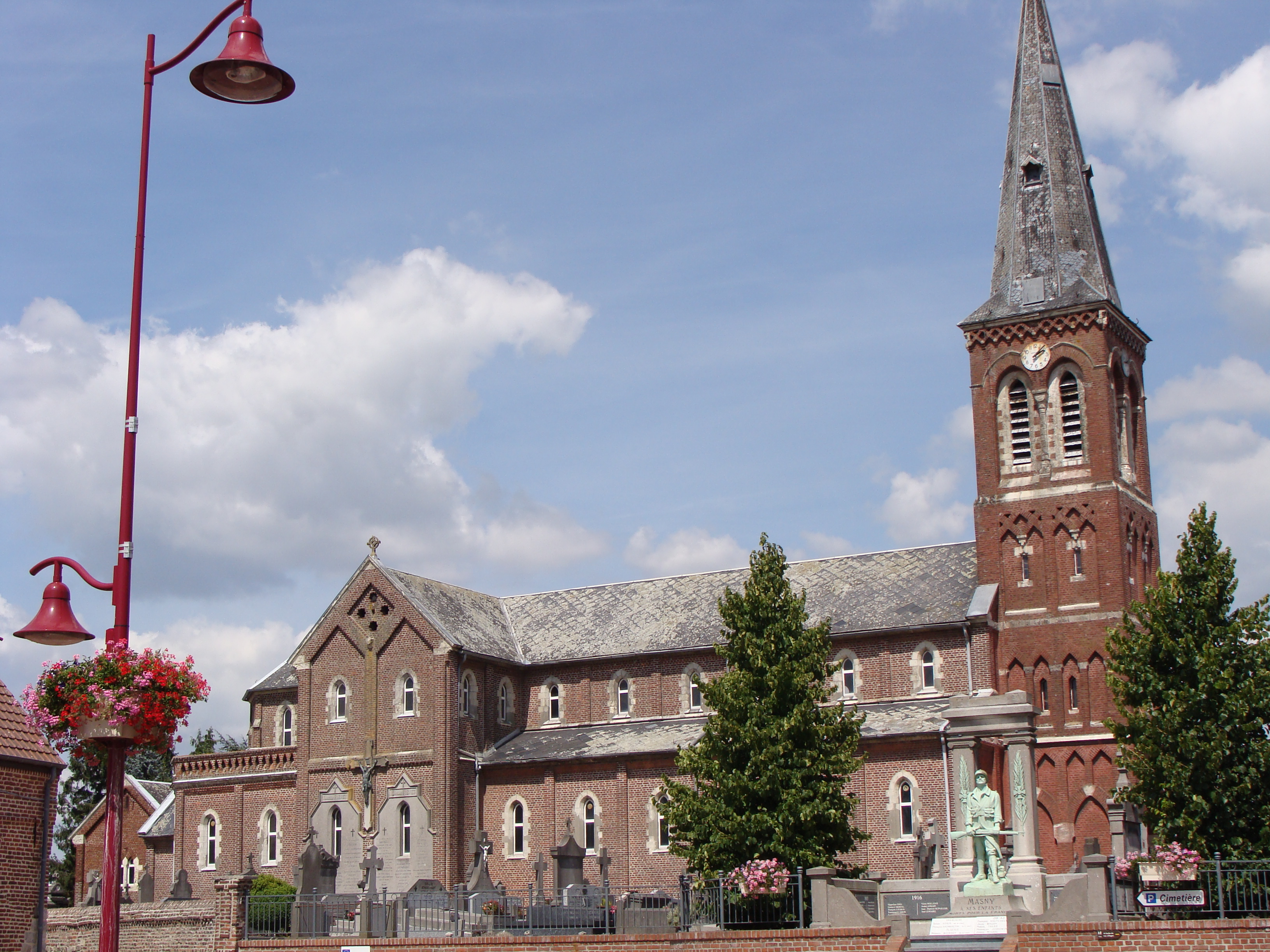 Masny - l'église